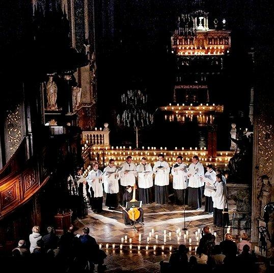 Dieses Foto zeigt die Choralschola bei ihrem Konzert in der Kathedrale von Płock, Polen. An der Gambe Maria Valencia. [1]